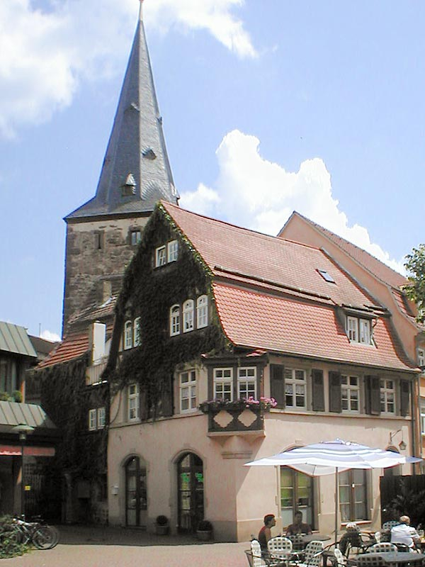 Haspelturm und Spohrsches Haus in Eberbach/Neckar